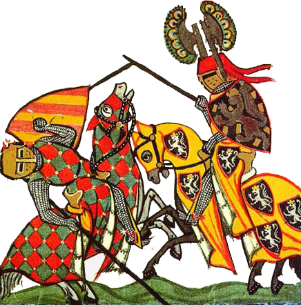 Codex Manesse, UB Heidelberg, Cod. Pal. germ. 848, fol. 52r: Walther von Klingen, Detail